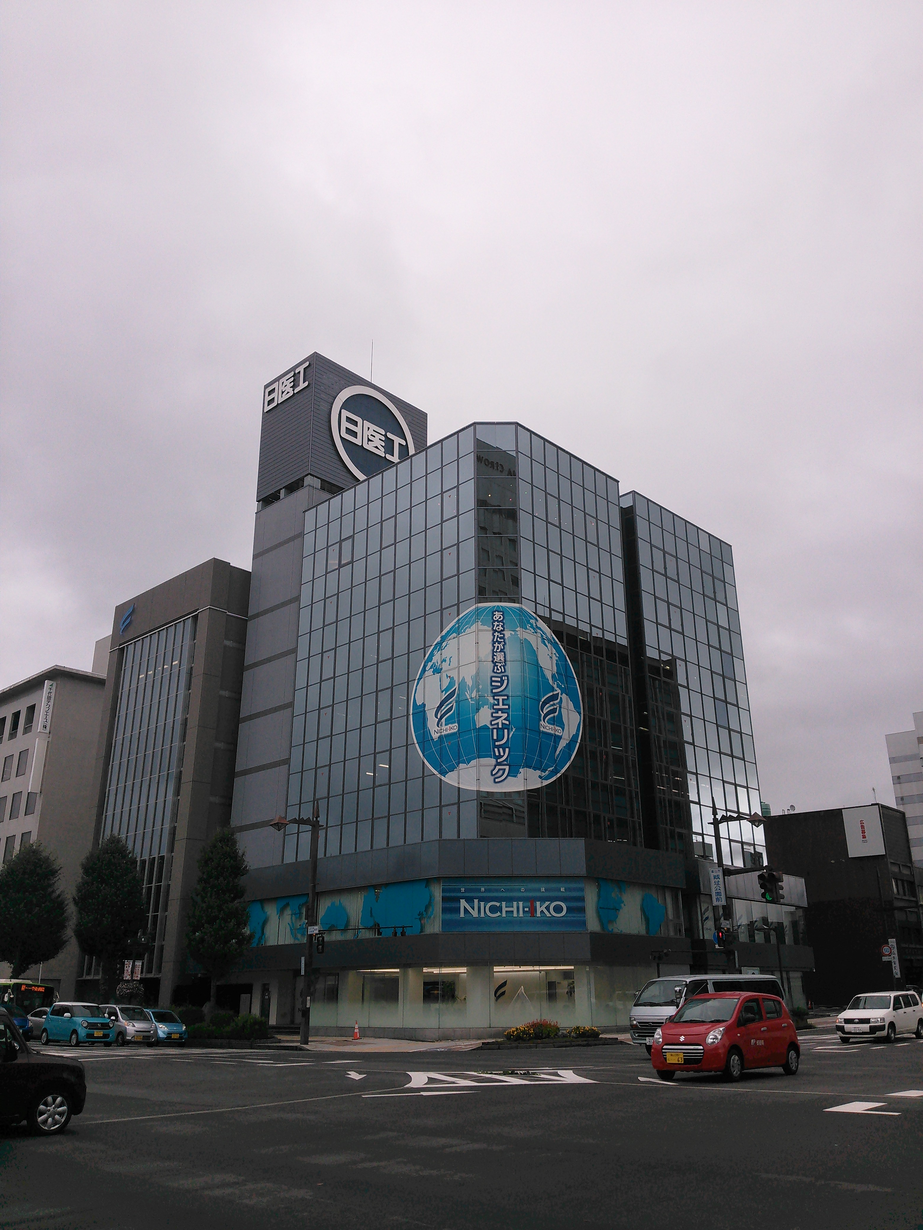 富山県富山市、日医工本社